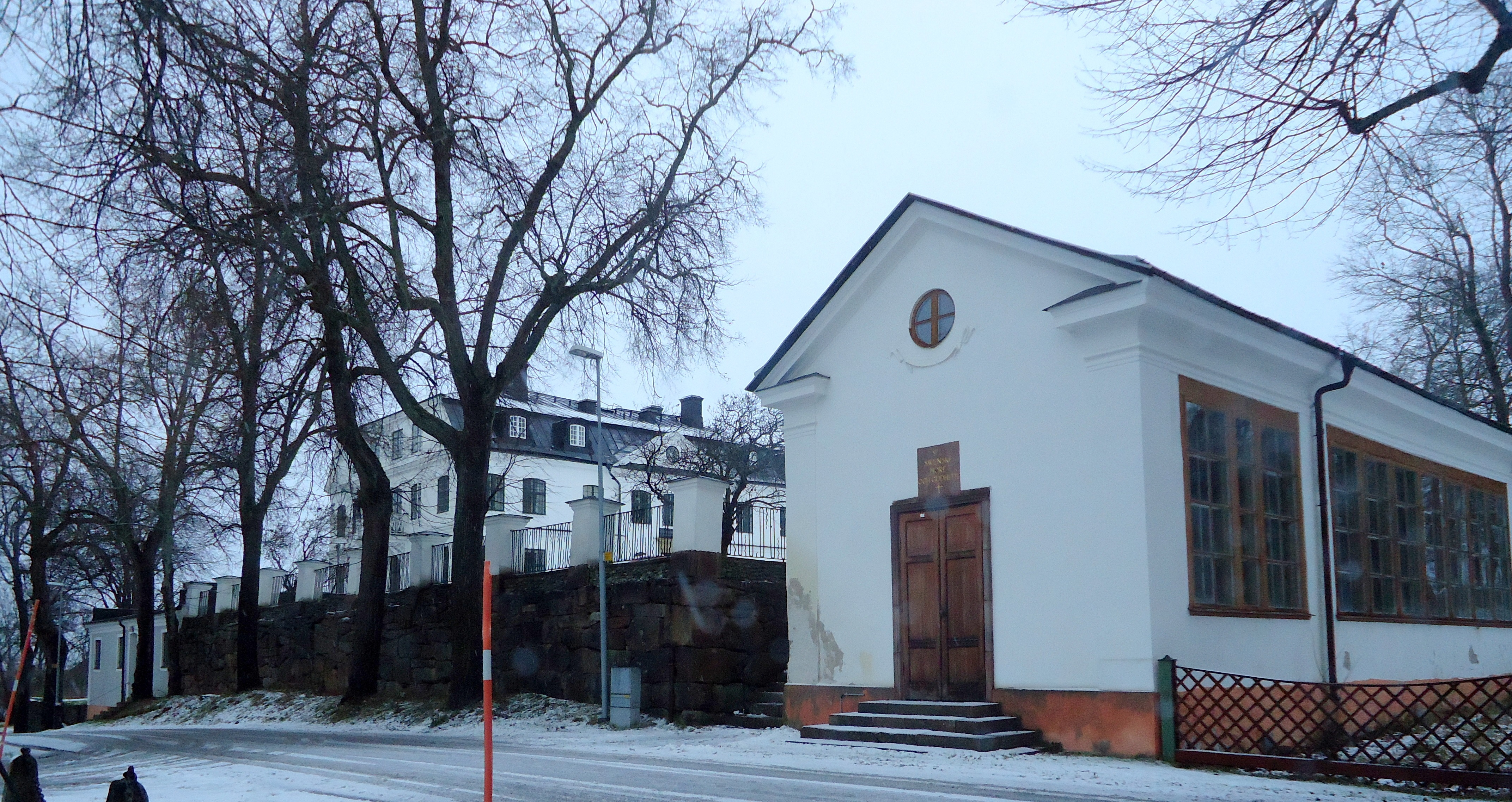 Orangeri från 1801, troligen ritat av Olof Forsgren. Byggdes om till Kapell 1840. Erik Bergman, Ingmar Bergmans far som var präst, predikade i lokalen under sin tid som komminister i Valbo socken, i Forsbacka. I filmen om Ingmar Bergmans föräldrar, Den goda viljan, spelades dock inga scener in i Forsbacka. Bruksmiljöer och organgeriscener spelades istället in i b la Strömsbergs bruk, Uppsala län, i det fiktiva Forsboda.